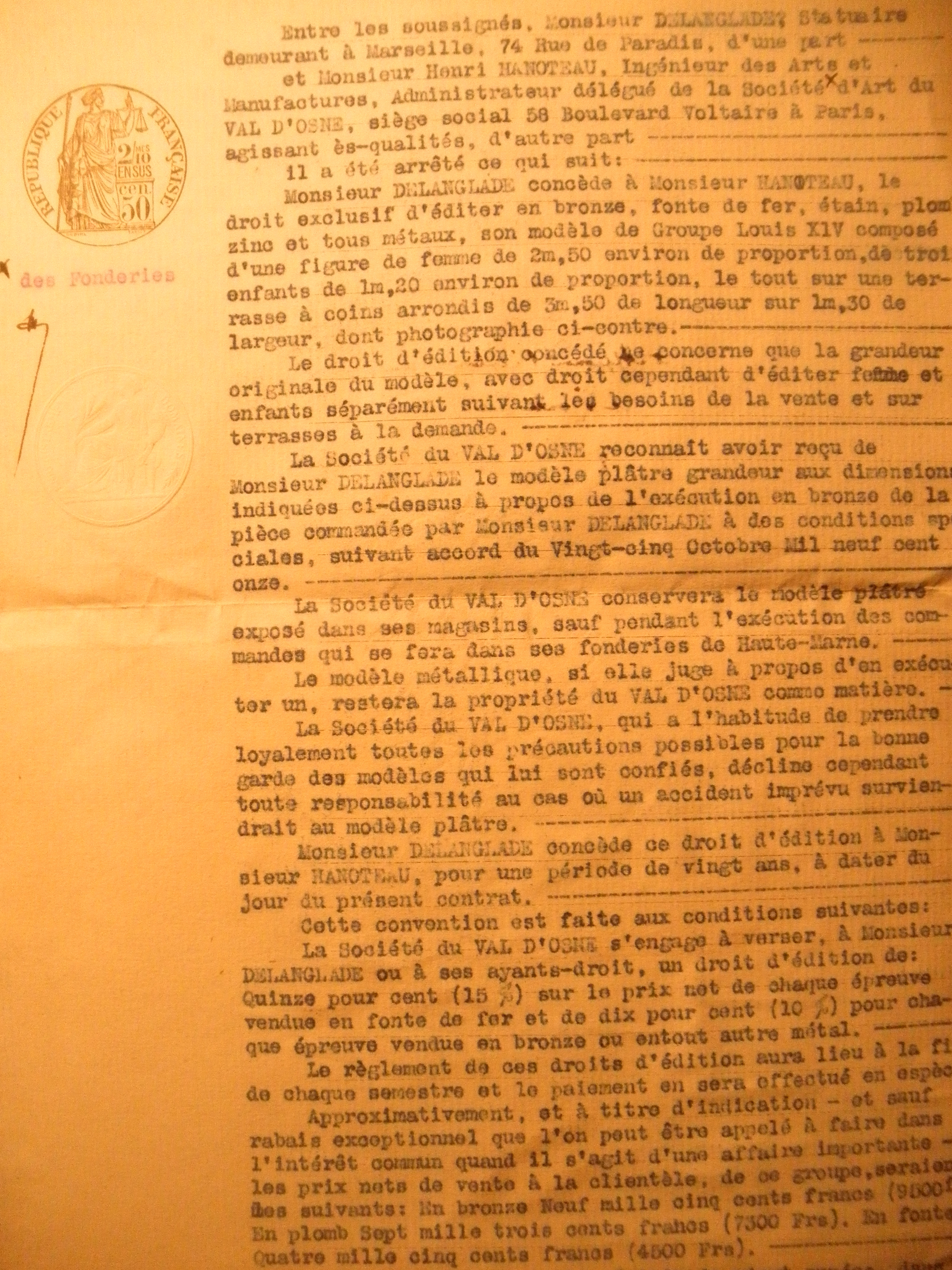 1910 contrat Bonnasse Val d'Osne